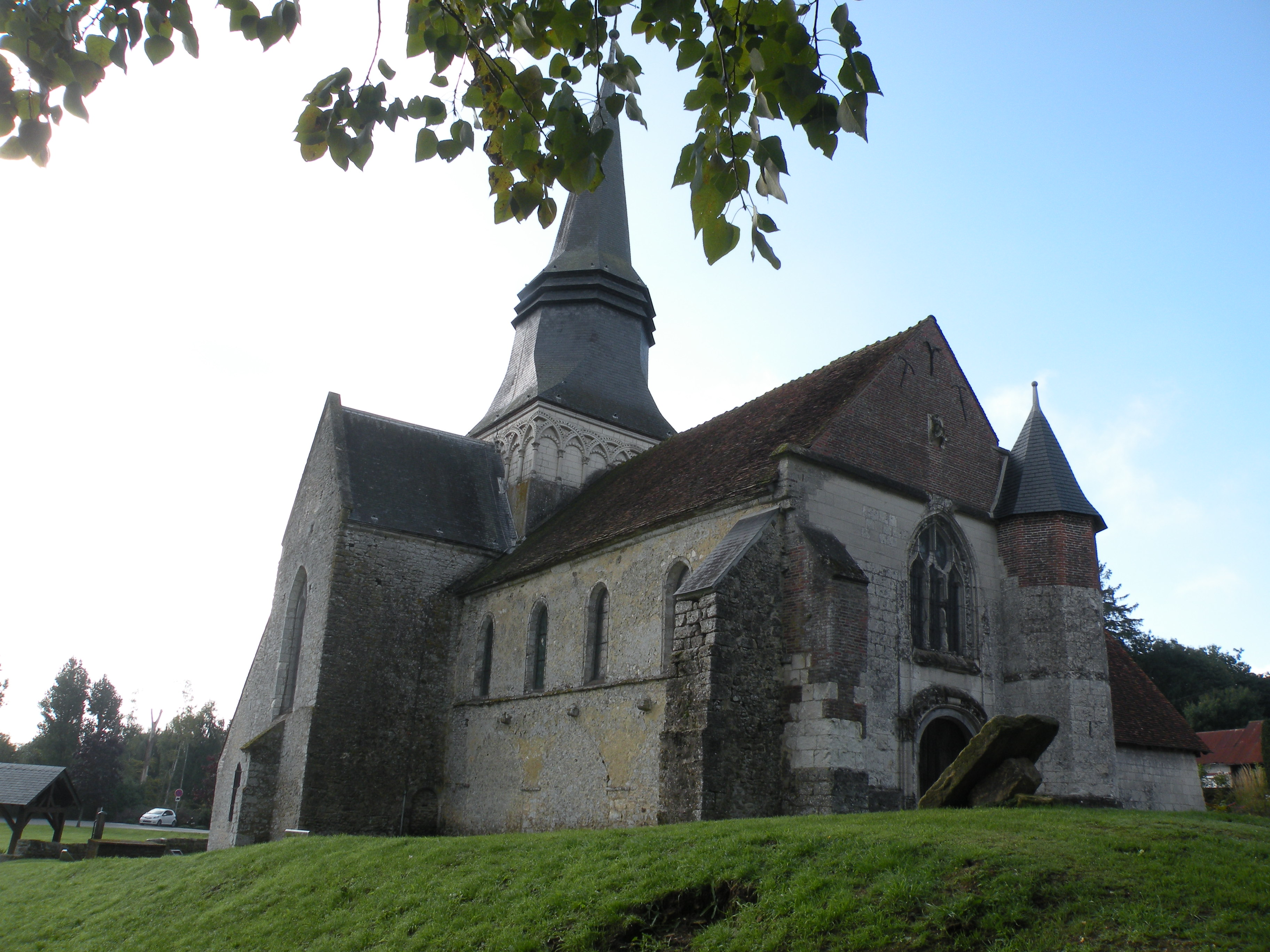 Église Notre-Dame de Fontenay-Torcy .